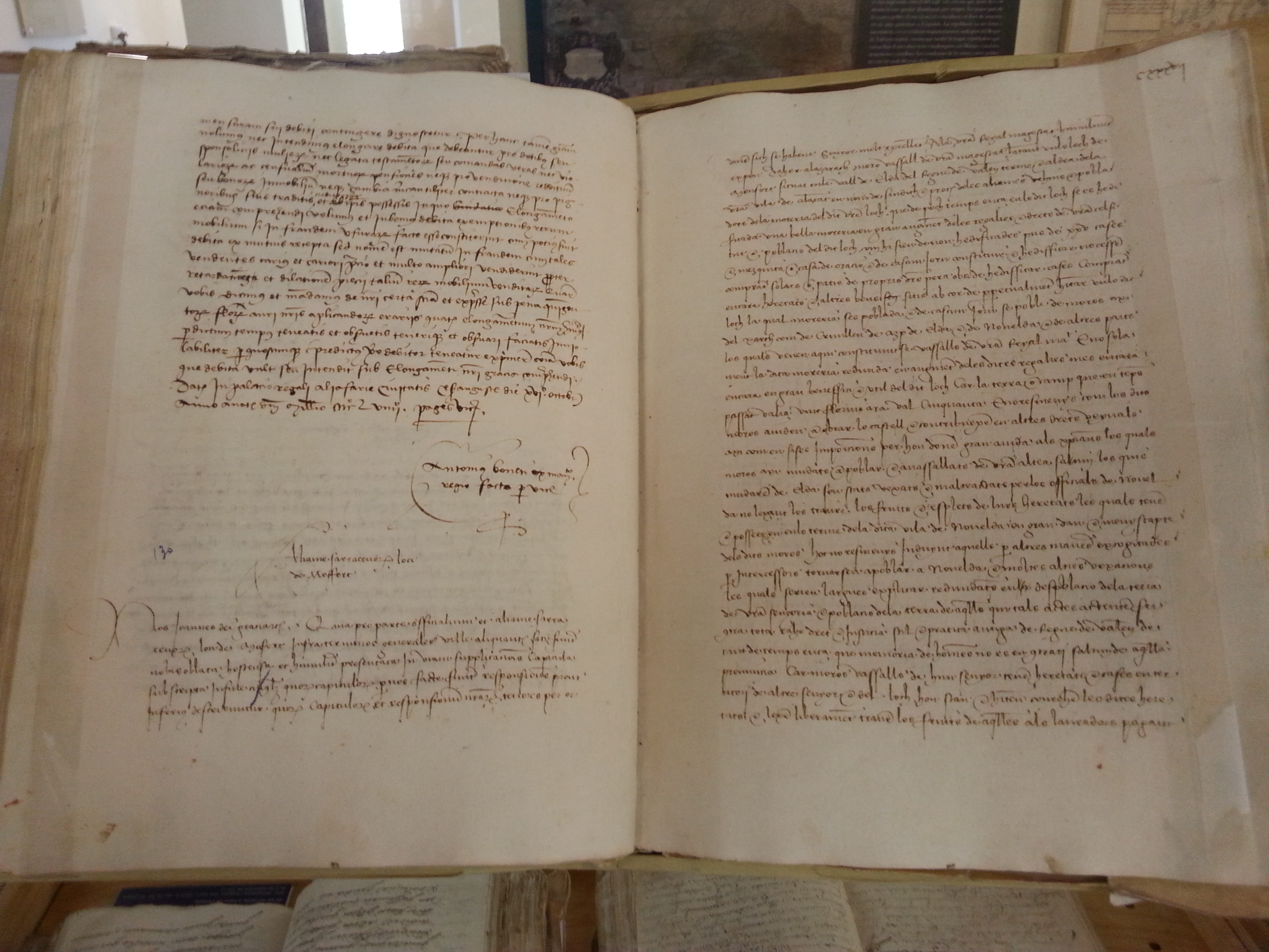 El rei Joan II d'Aragó aprova els capítols de poblament per als musulmans que s'hi han instal.lat a la nova moreria de Monforte, situada a la Vall d'Elda i en el terme general d'Alacant (any 1459). Arxiu del Regne de València. ARVː Reial Cancelleria, núm. 283, fol. 136v.